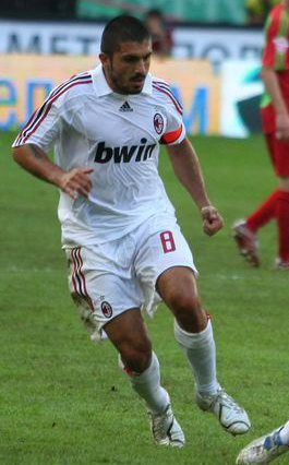 Gennaro Gattuso